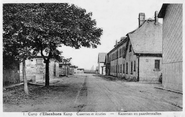 Unterkünfte im Lager Elsenborn